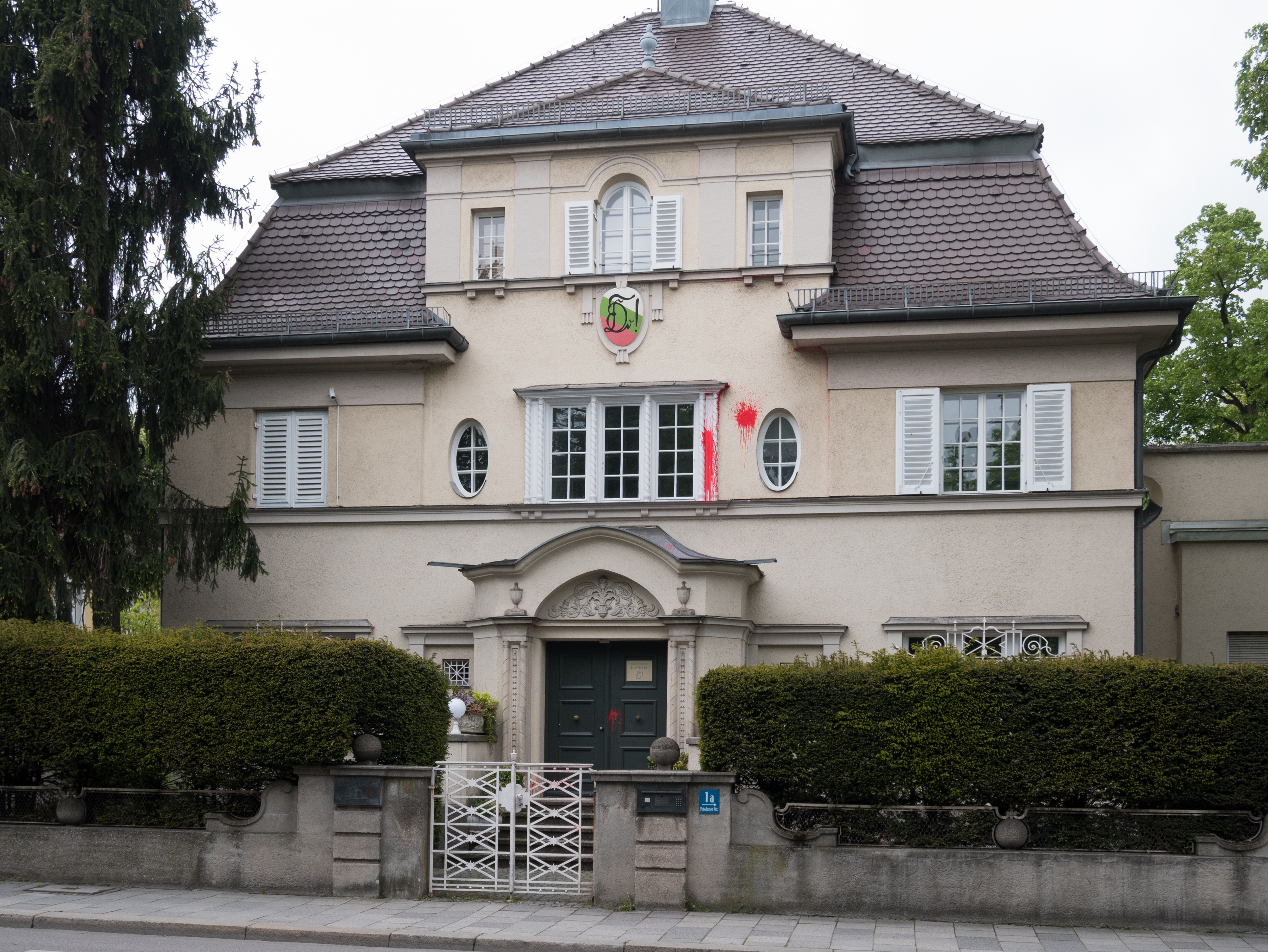 Verbindungshaus der Burschenschaft Danubia München in der Potsdamerstraße 1a, Frontalansicht